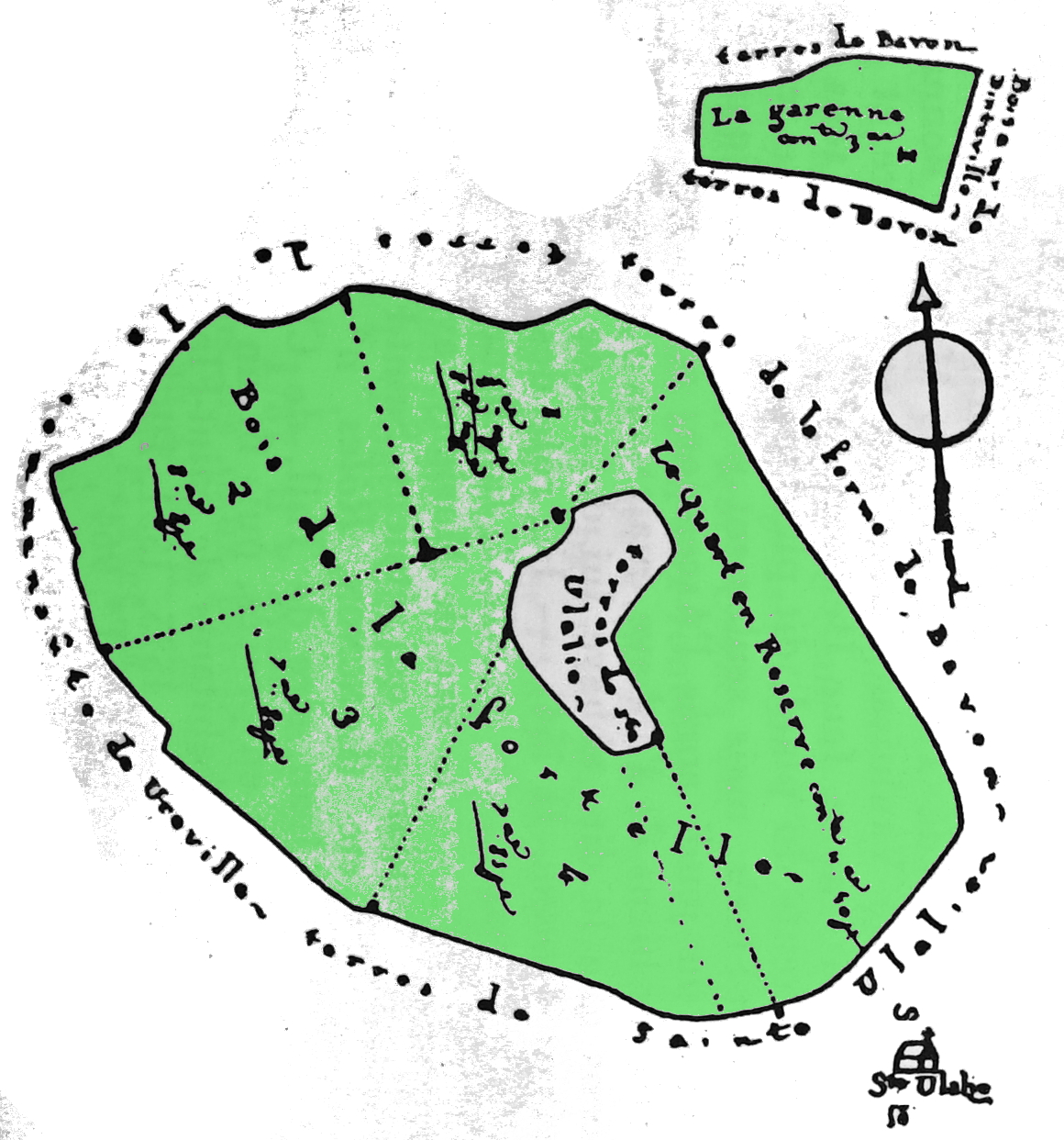 Terres et prieuré de sainte eulalie, conservé AD Aube.